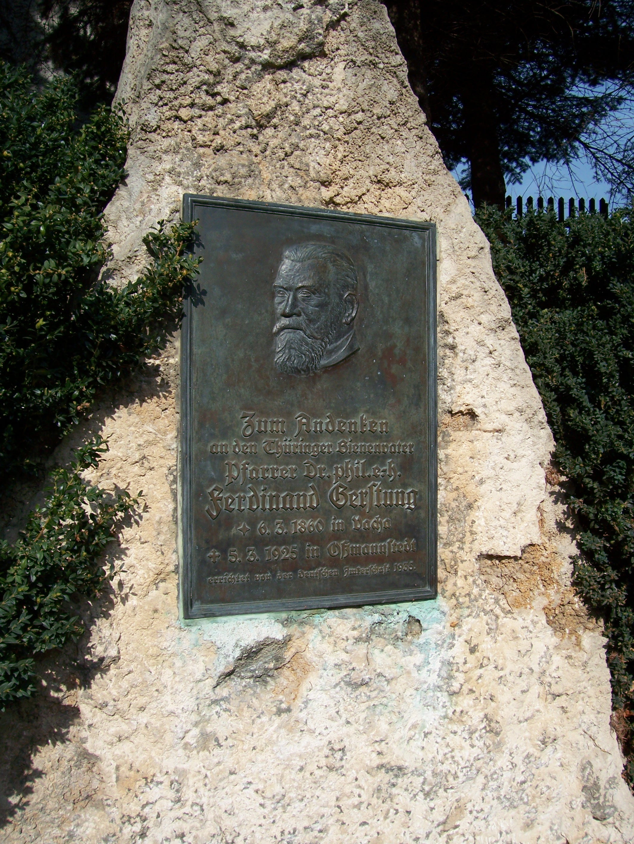 Ein Denkmal in Oßmannstedt (Deutschland) für den Bienenvater und Pfarrer Ferdinand Gerstung (1860-1925).